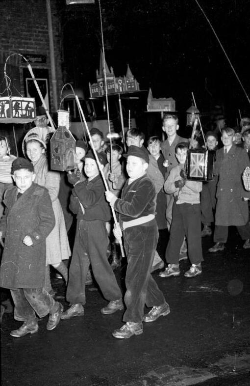 St.-Martins-Umzug in Urdenbach